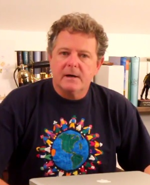 Juan Luis Cano